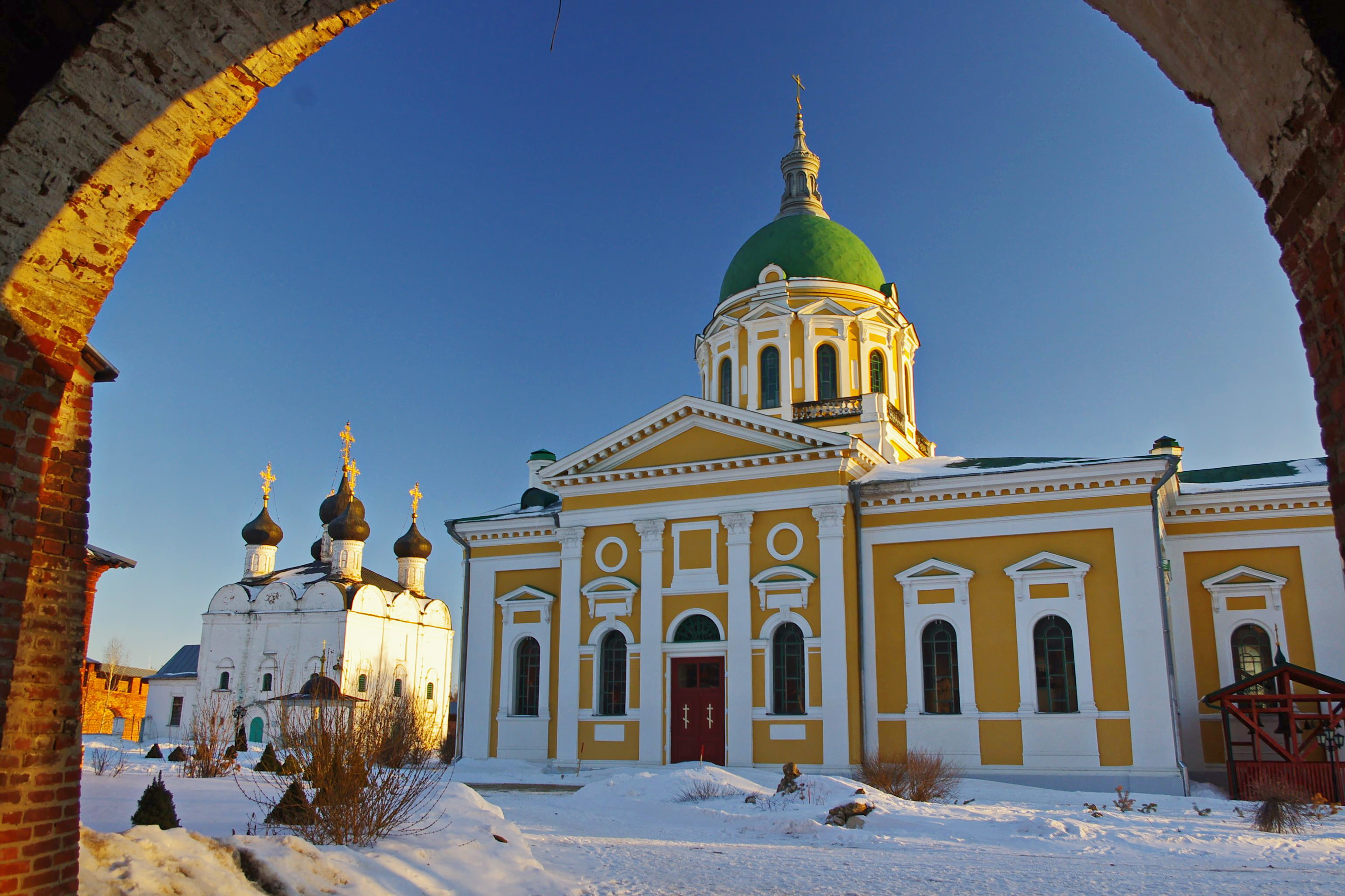 Церковь Иоанна Предтечи (собор Усекновения Главы Иоанна Предтечи) (Москва и Московская область, Зарайск, Музейная улица)